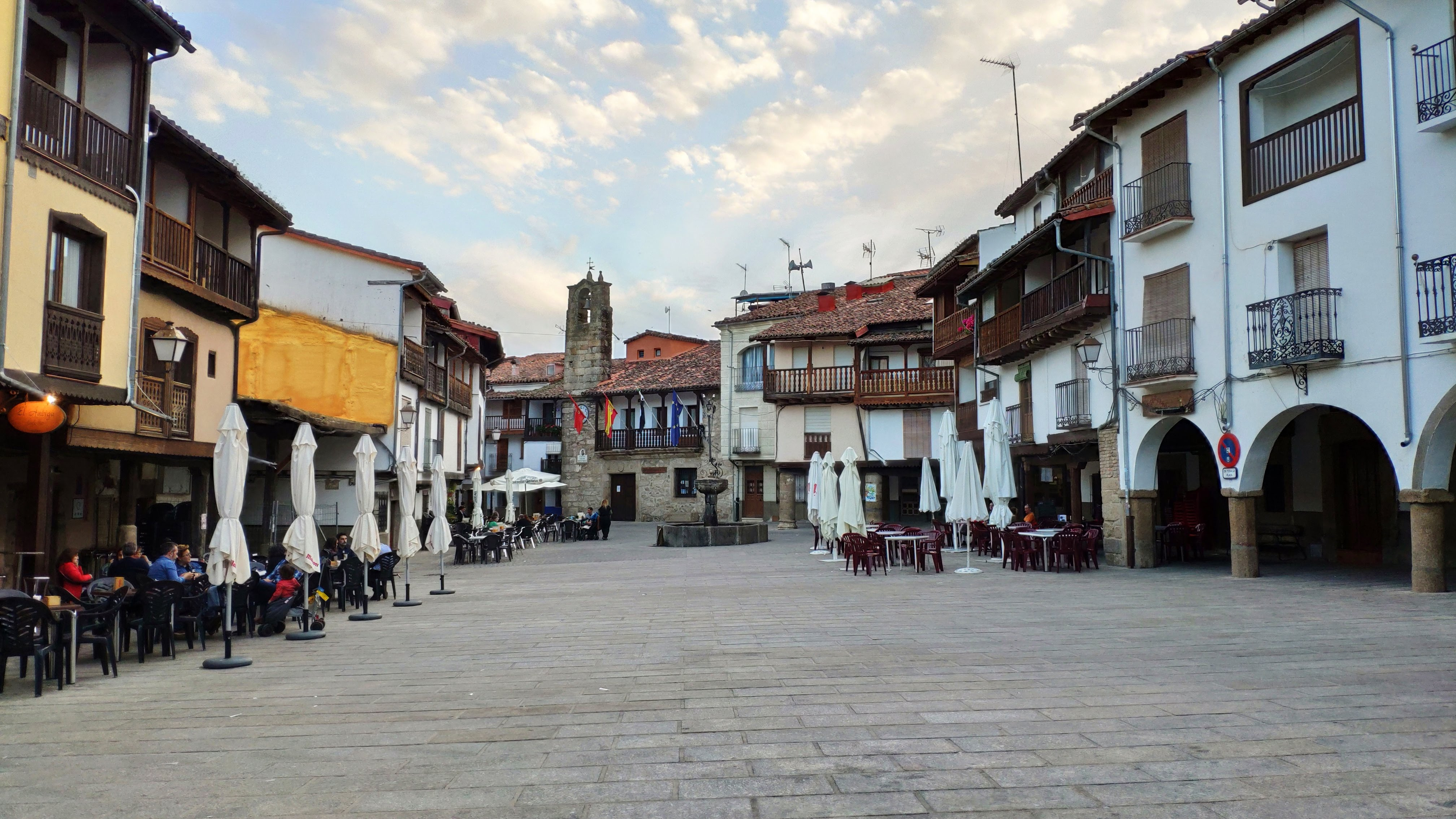 Plaza de Villanueva de la Vera, provincia de Cáceres